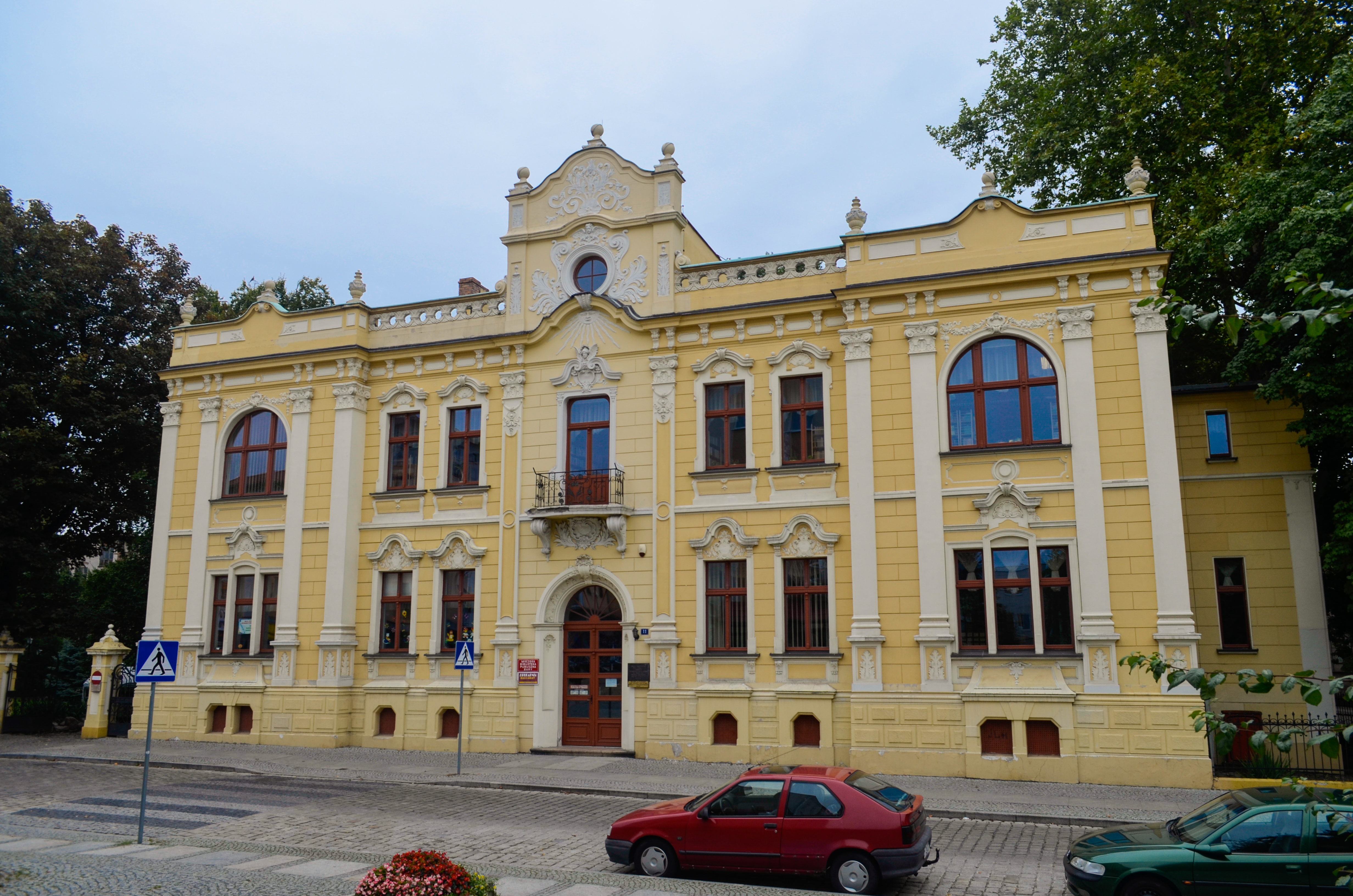 Żary, ul. Wrocławska 11 - dom, ob. biblioteka, ok. 1900